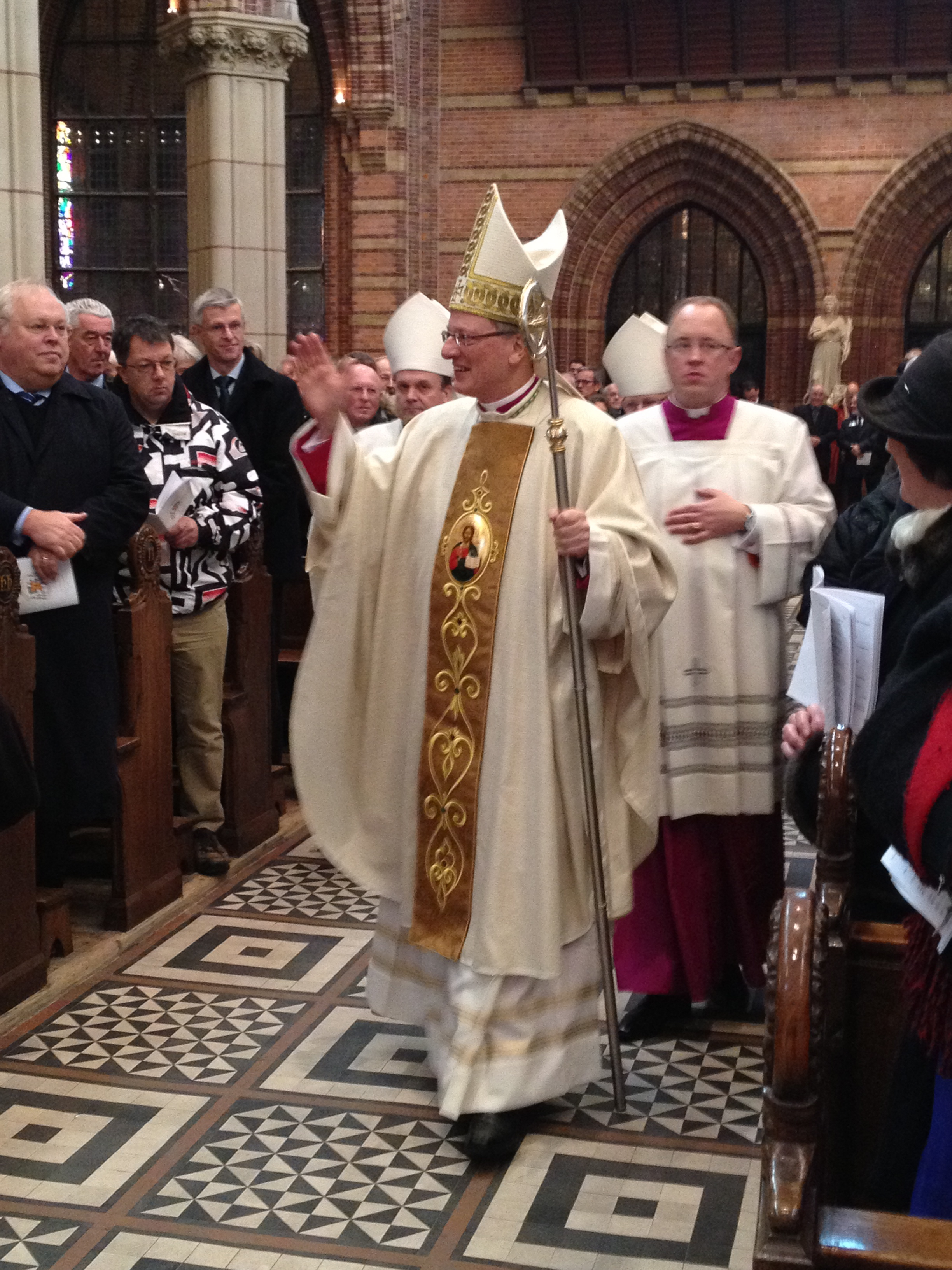 Hulpbisschop Jan Hendriks na zijn wijding in de Sint-Vituskerk in Hilversum op 10 december 2011.